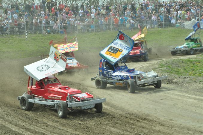 Een foto van een Stockcar F1 wedstrijd in St. Maarten, 2010. De klasse welke te zien is, is de landklasse.